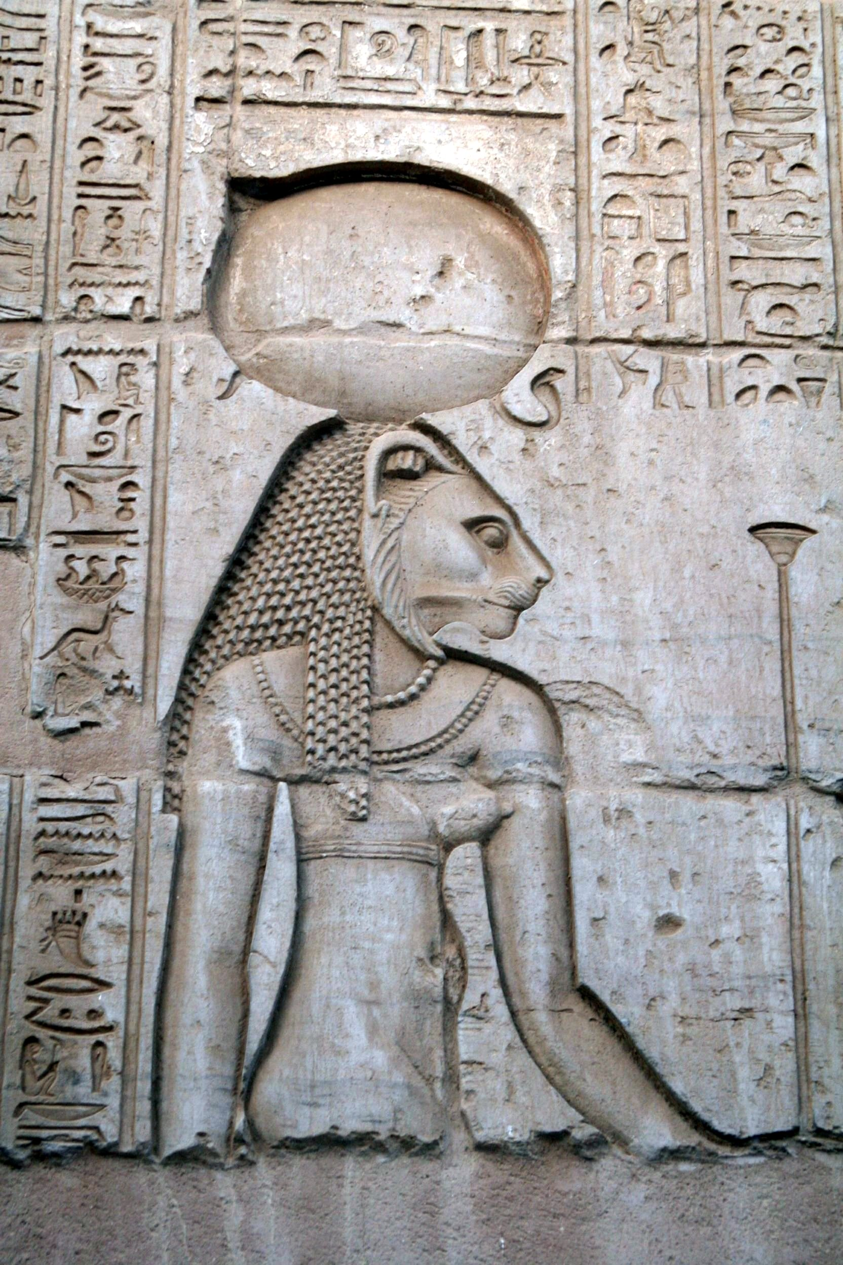 Kom Ombo - Temple of Sobek & Haroeris